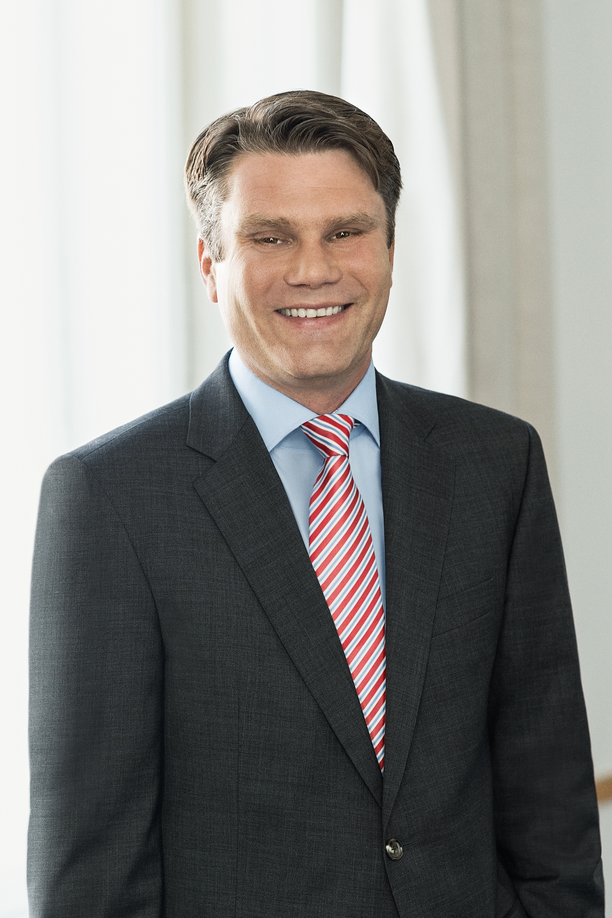 Johannes Rauch, politician of Austrian People's Party (ÖVP)